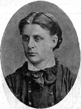 Батюшкова Варвара Николаевна - русская революционерка, народница